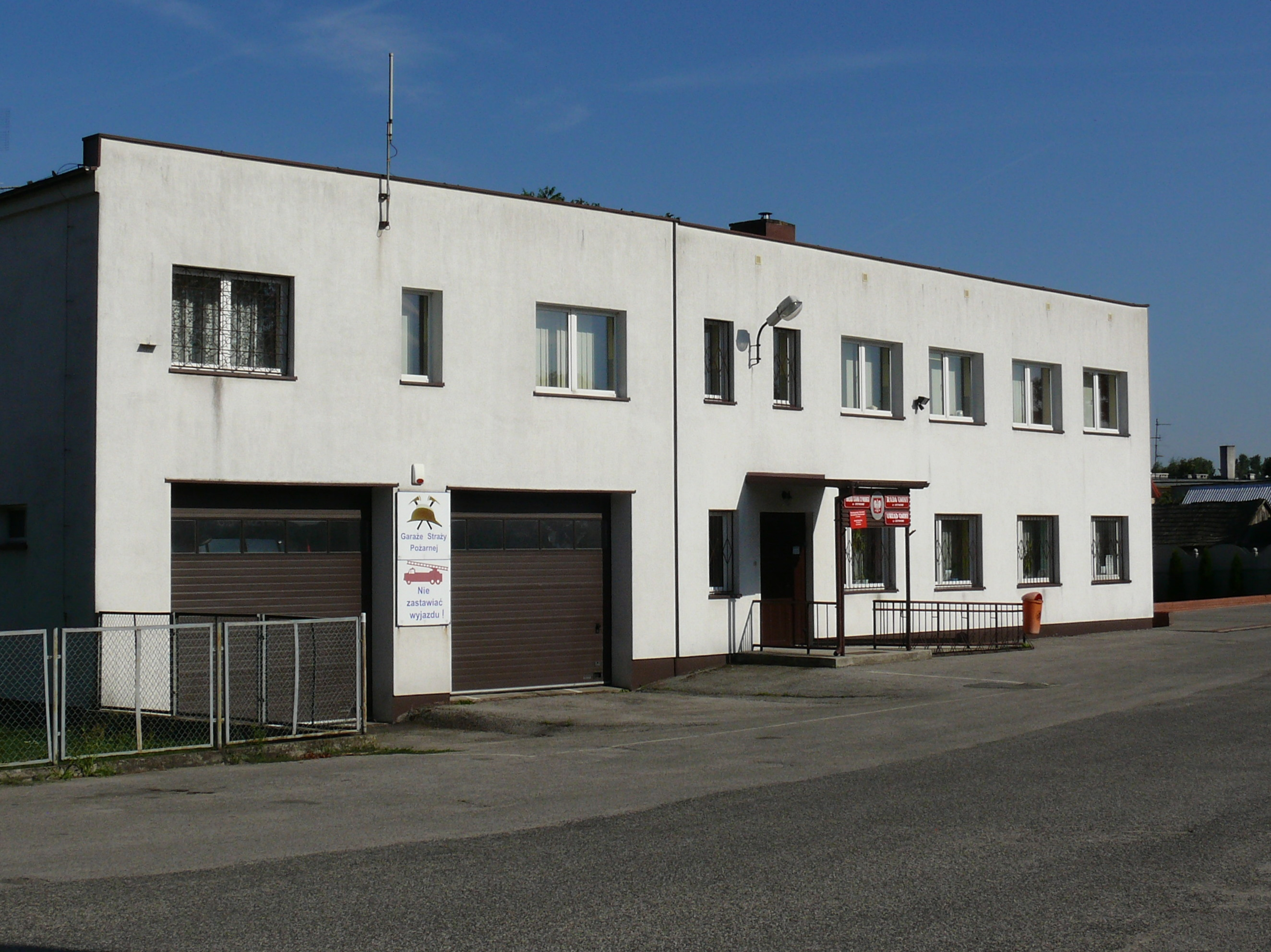 Gmach Urzędu Gminy i OSP w Krzymowie